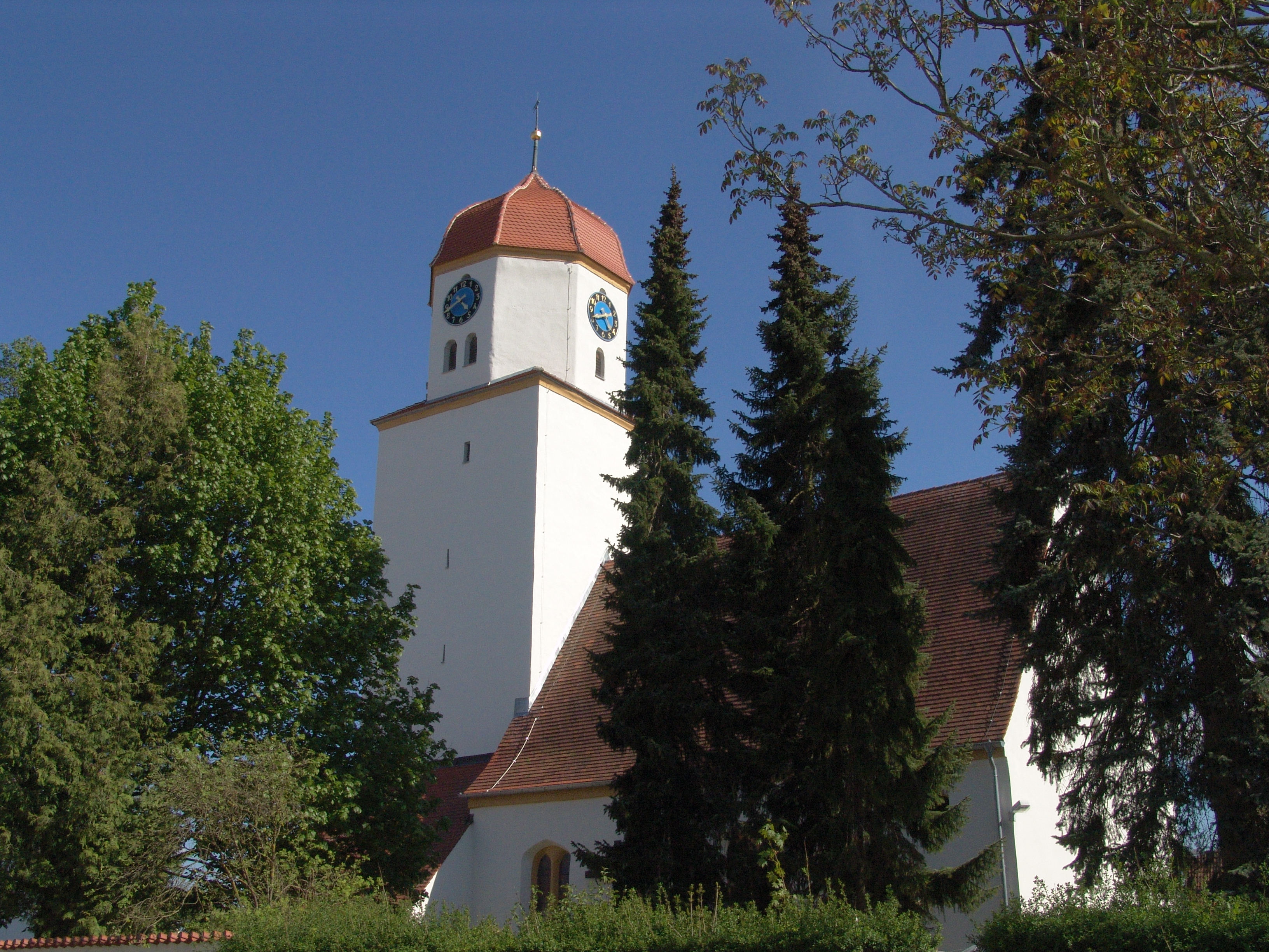 evang.-luth. Kirche St. Georg in Pfäfflingen